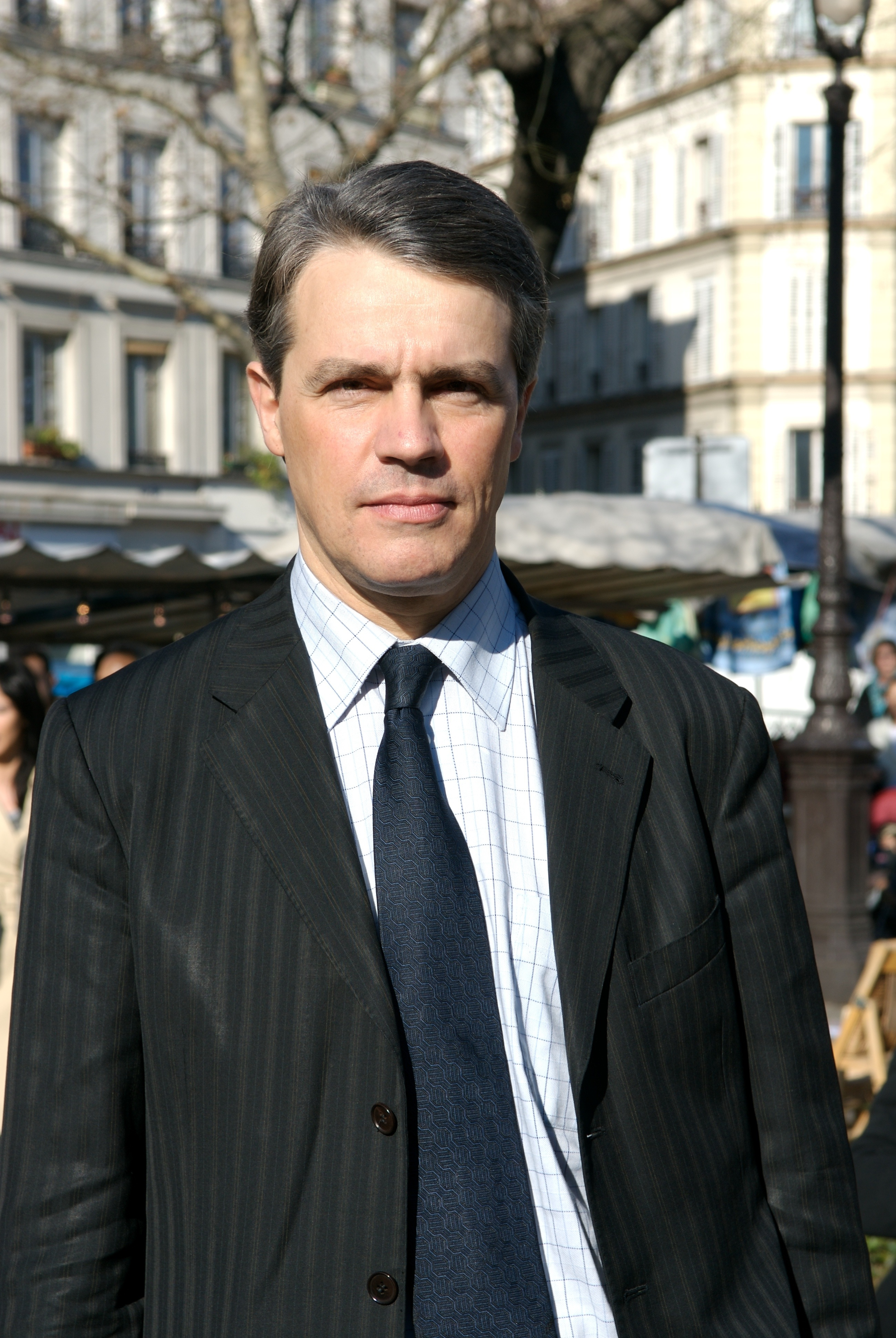 Patrick Bloche, photo prise sur le marché Bréguet-Sabin, Paris 11e, le 10 février 2008